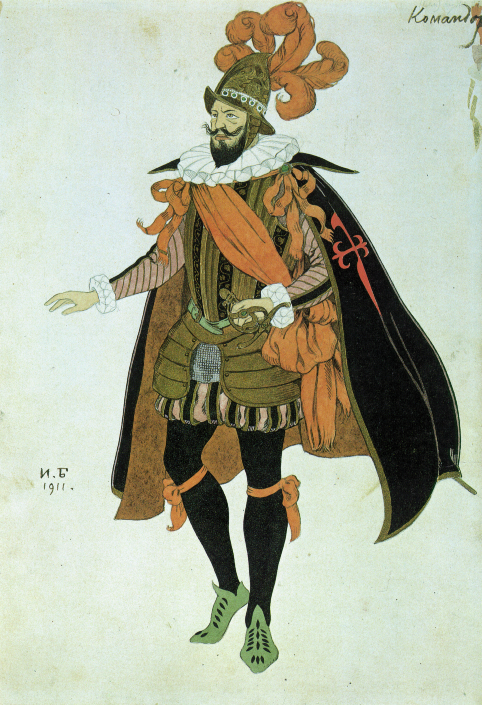 копия иллюстрации - И. Билибин. Эскиз костюма Командора к драме Лопе де Веги "Фуэнте Овехуна". 1911. Старинный театр.